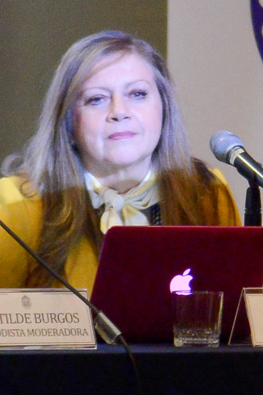 Celebración del aniversario nº63 del Colegio de Periodistas de Chile.